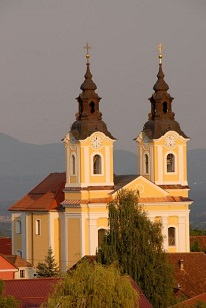 Sv. Lovrenc